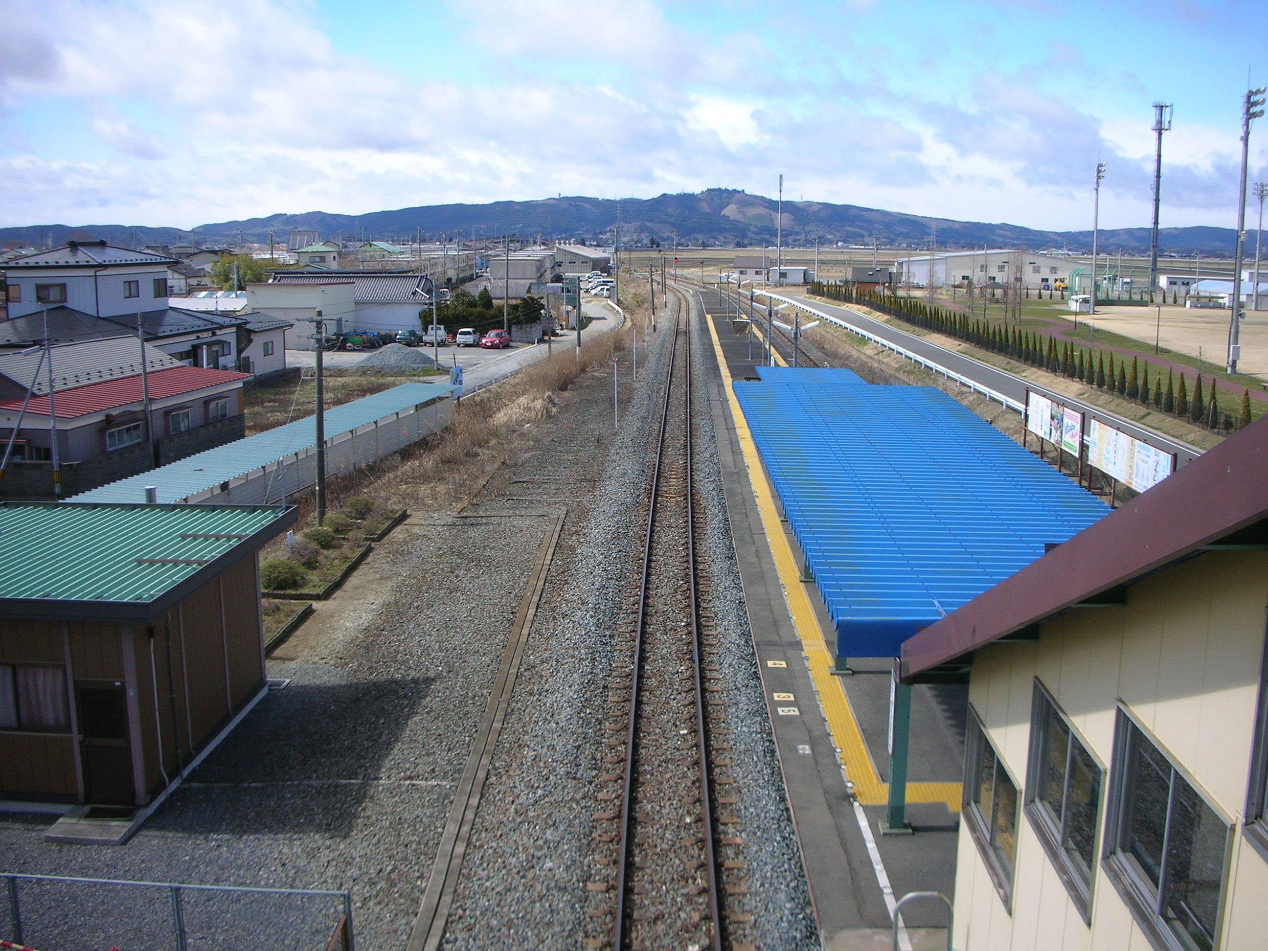 陸前豊里駅から観る篦岳山